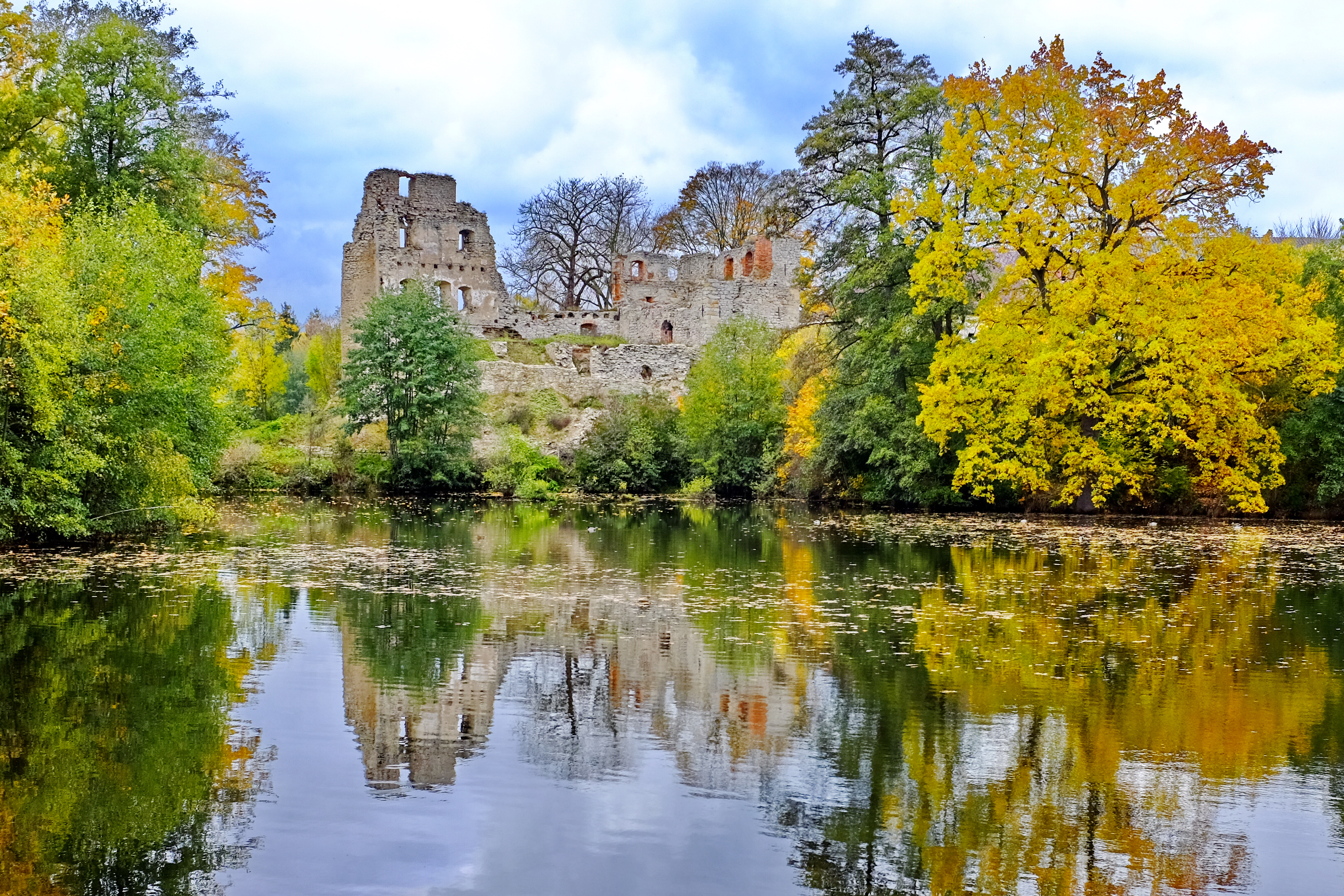 Hrad Starý rybník, Starý Rybník 1, Starý Rybník.